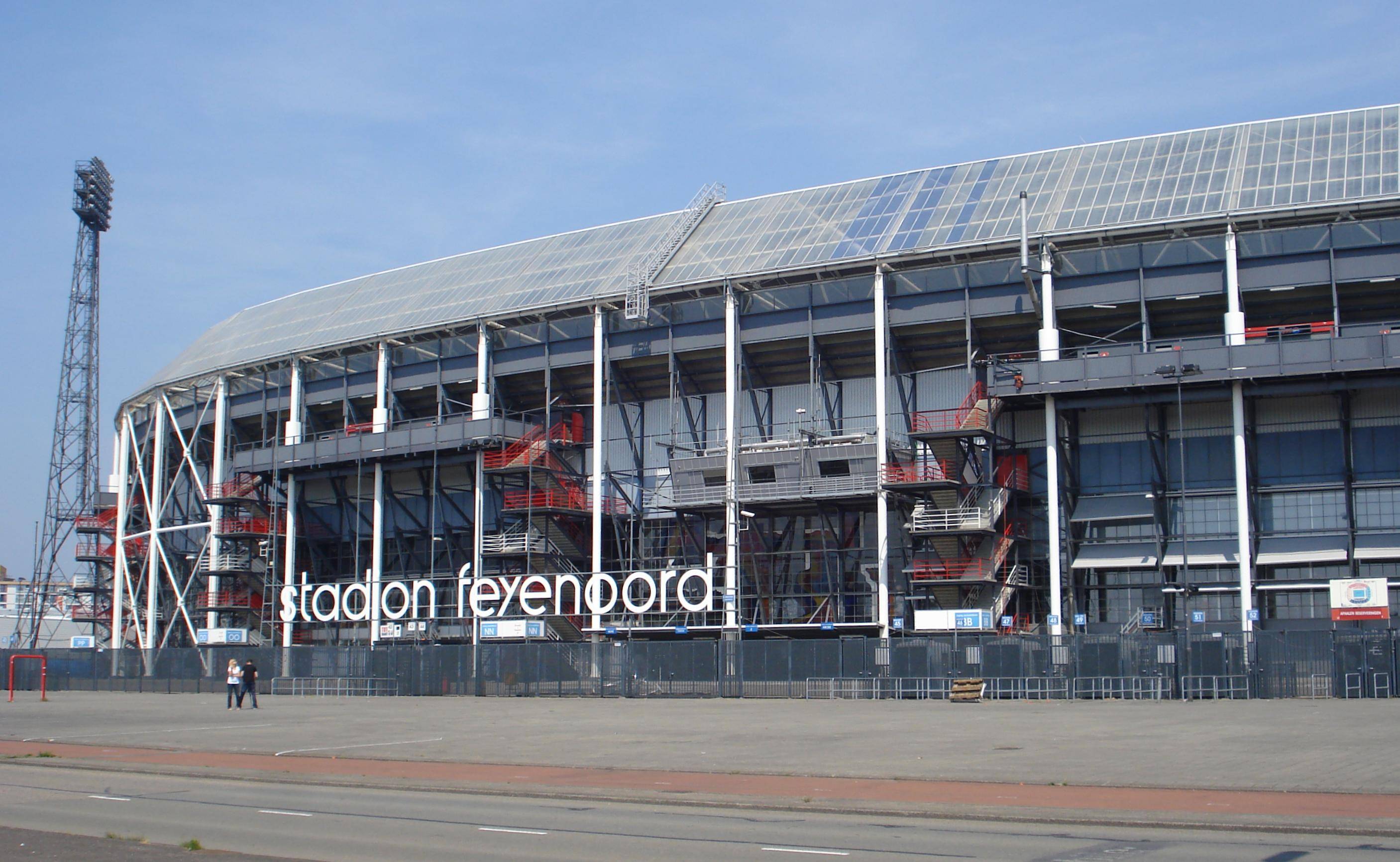 Rotterdam, Feyenoord_stadion "De Kuip". Gemeentemonument.